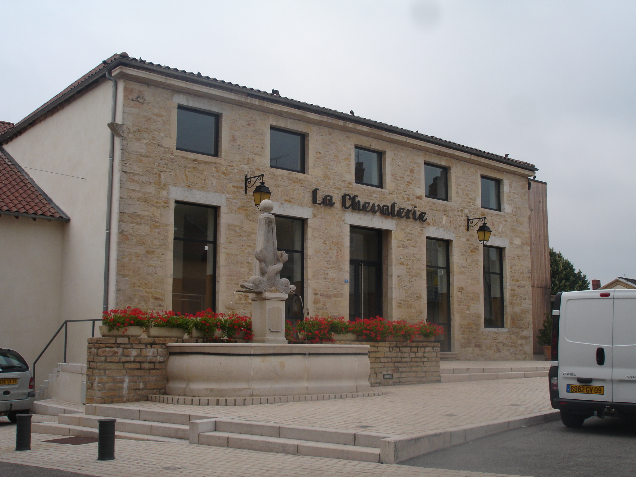 Salle de spectacle et cinéma de Saint-Amour en franche-Comté dans le département du Jura